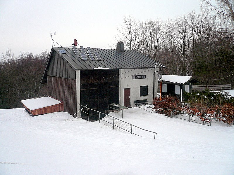 Blicklift am Kreuzberg, Deutschland